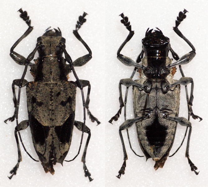 Bates,1862 Sex: Male Data: 02-2011 - Satipo - Rio Negro - Peru Size: ?